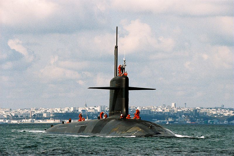 Sous-Marin Nucléaire Lanceurs d'Engins / SNLE-NG type le triomphant Le Vigilant